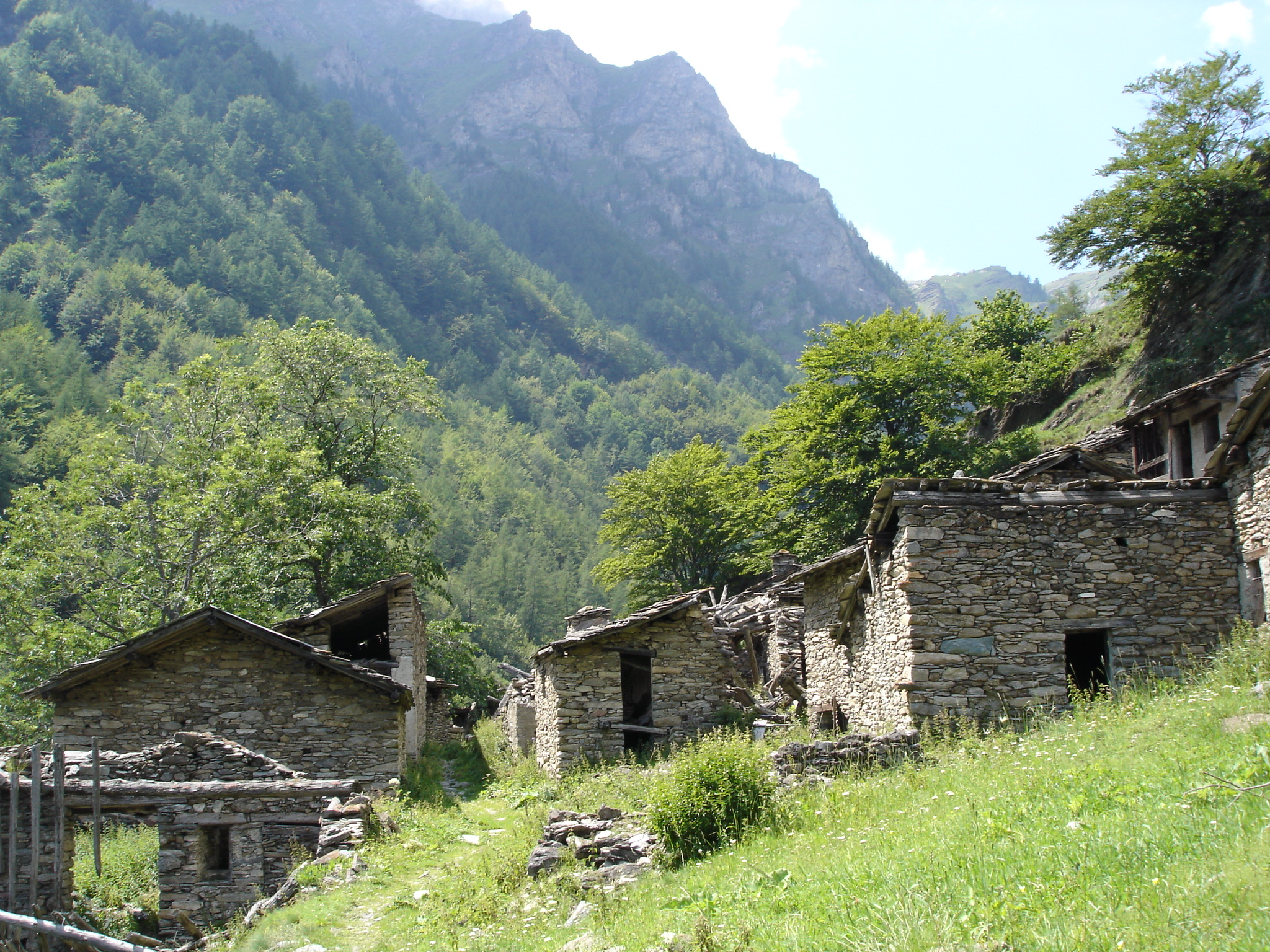 Hameau en ruine entre Balsiglia est le Lauson, à Massello, Val Germanasca, Piémont